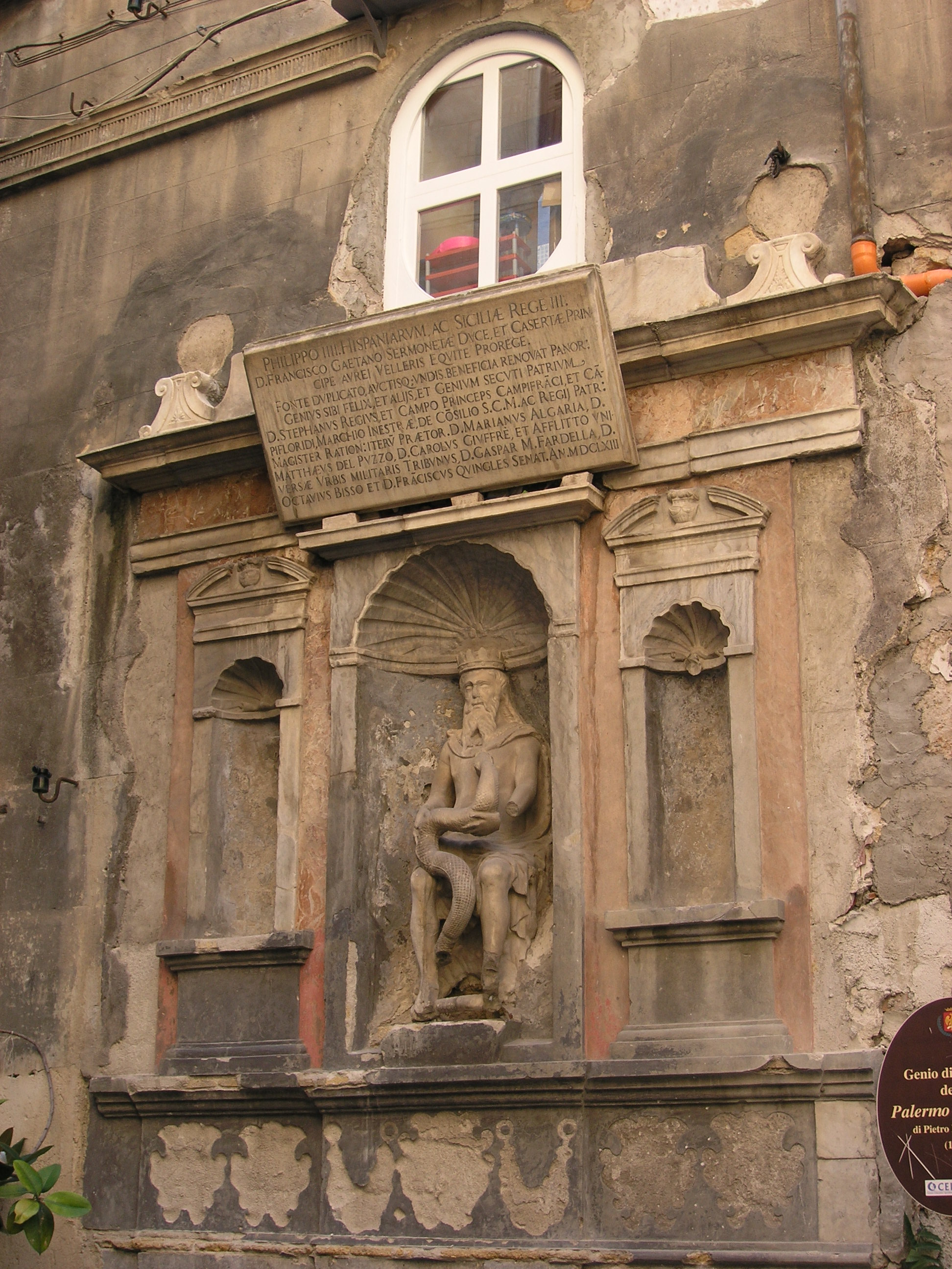 Sicilianu: Geniu di Palermu - Palermu lu Grandi - Pietro de Bonitate (1483)